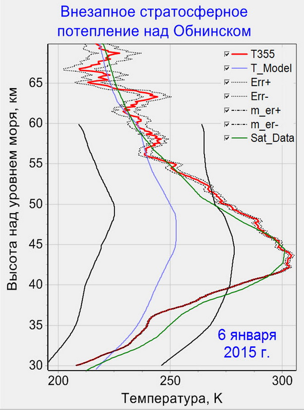 Внезапное стратосферное потепление над Обнинском. Красная линия – температура по данным лидарного зондирования, синяя – модель CIRA-1986, зеленая – данные спутника Aura / MLS. Результаты измерений получены в ФГБУ НПО "Тайфун"